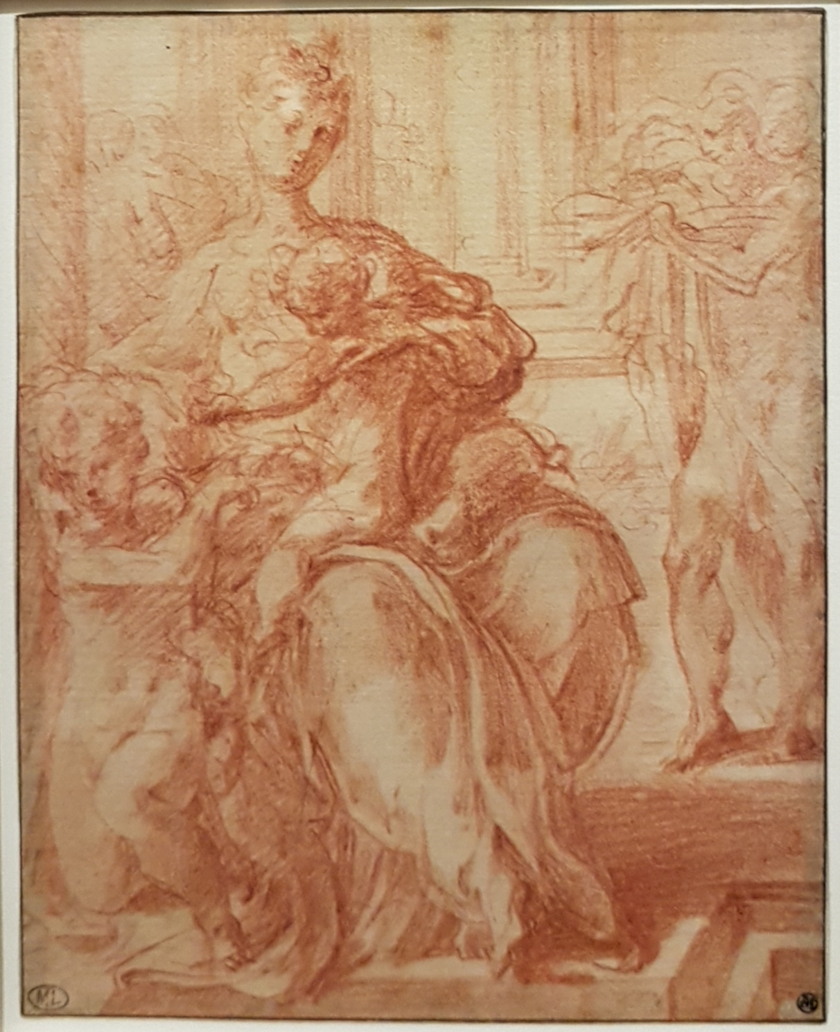 Francesco Mazzuola, dit Le Parmesan. La Vierge et l'Enfant avec le petit saint Jean et saint Jérôme. Sanguine. Louvre, département des Arts graphiques, inv. 6381. Étude pour La Madone au long cou (Florence, Offices).